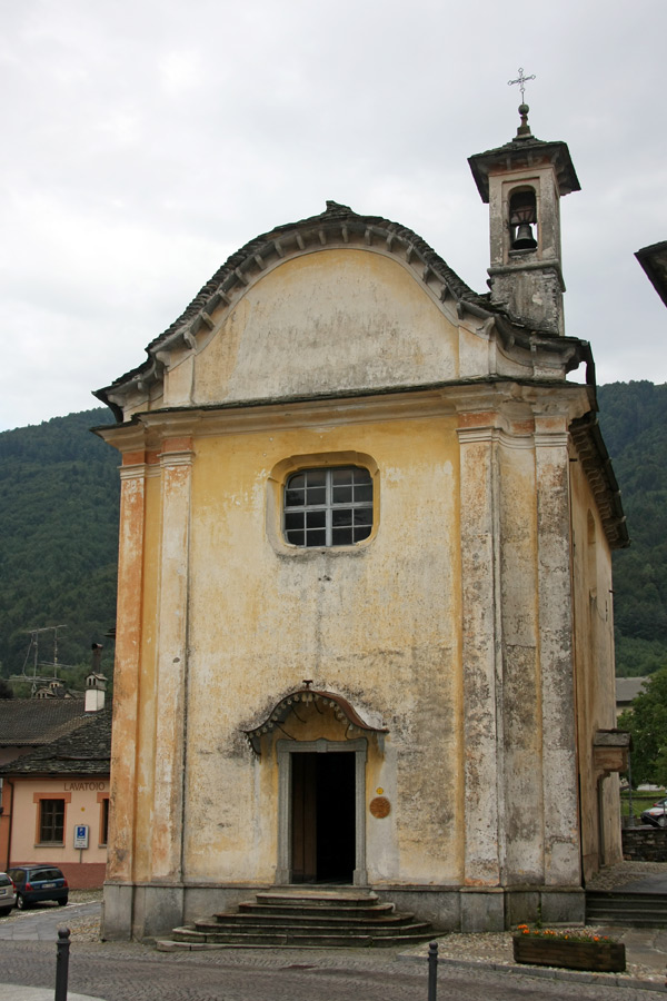 Oratorio di San Bernardino da Siena a Malesco (VB)